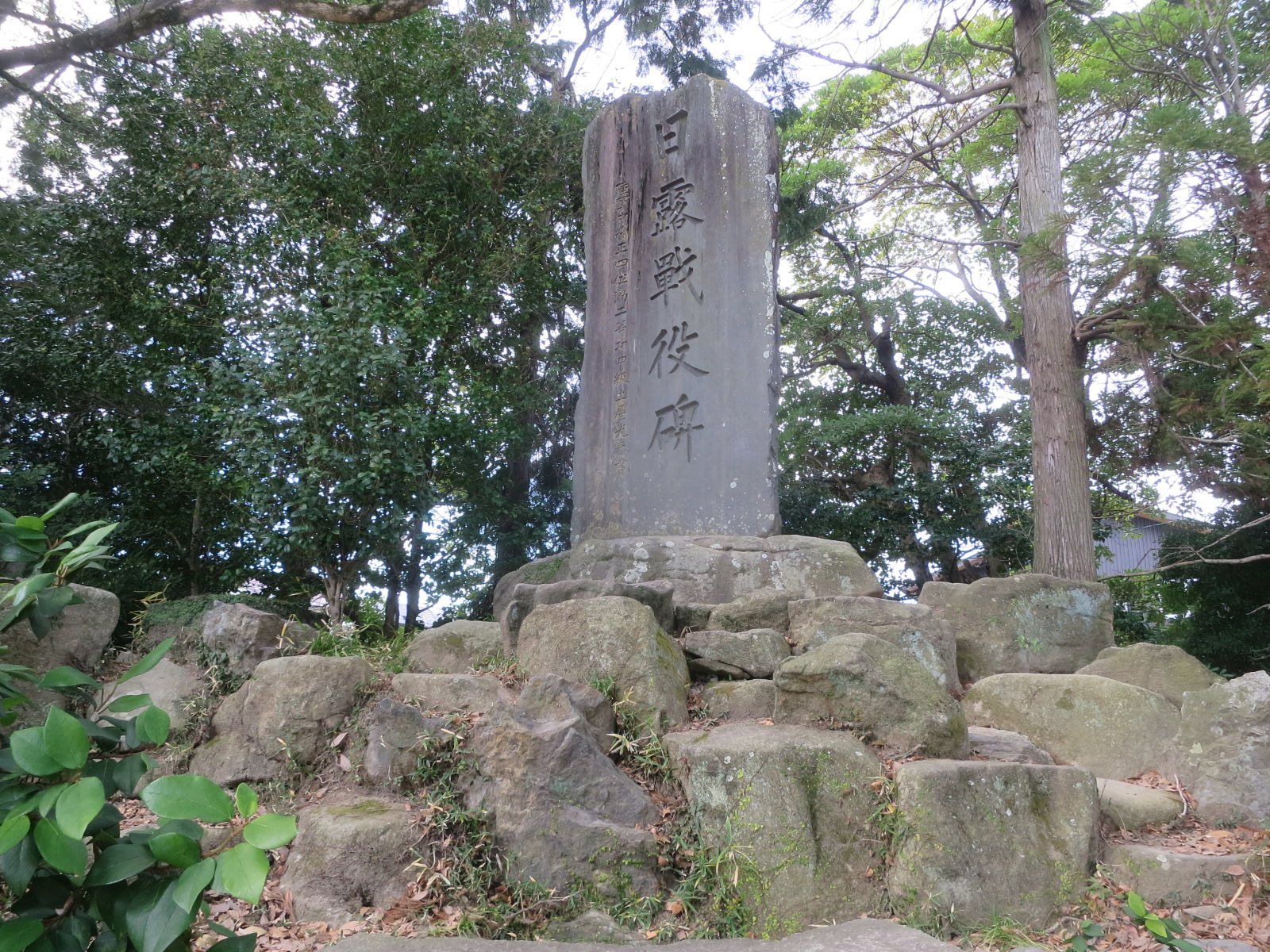 糟目犬頭神社境内の日露戦役碑